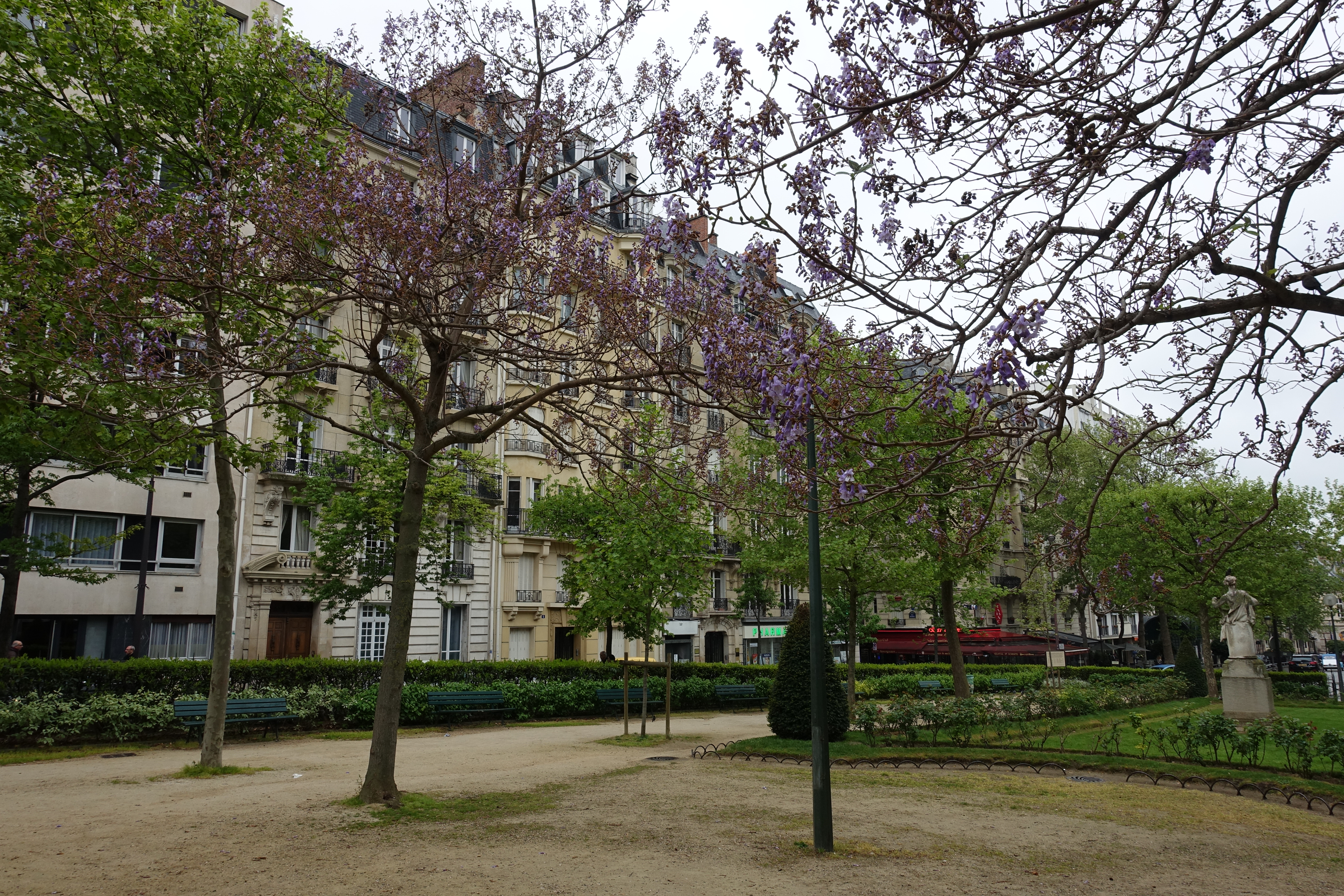 Square Adolphe Chérioux @ Paris